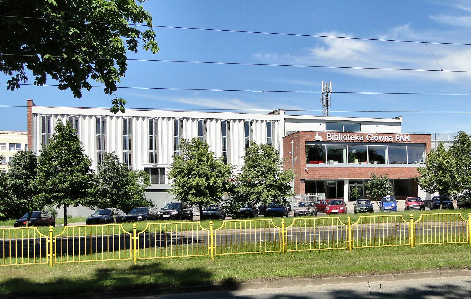 Gmach Biblioteki Głównej Pomorskiej Akademii Medycznej w Szczecinie (dawny klub studencki "Trans"